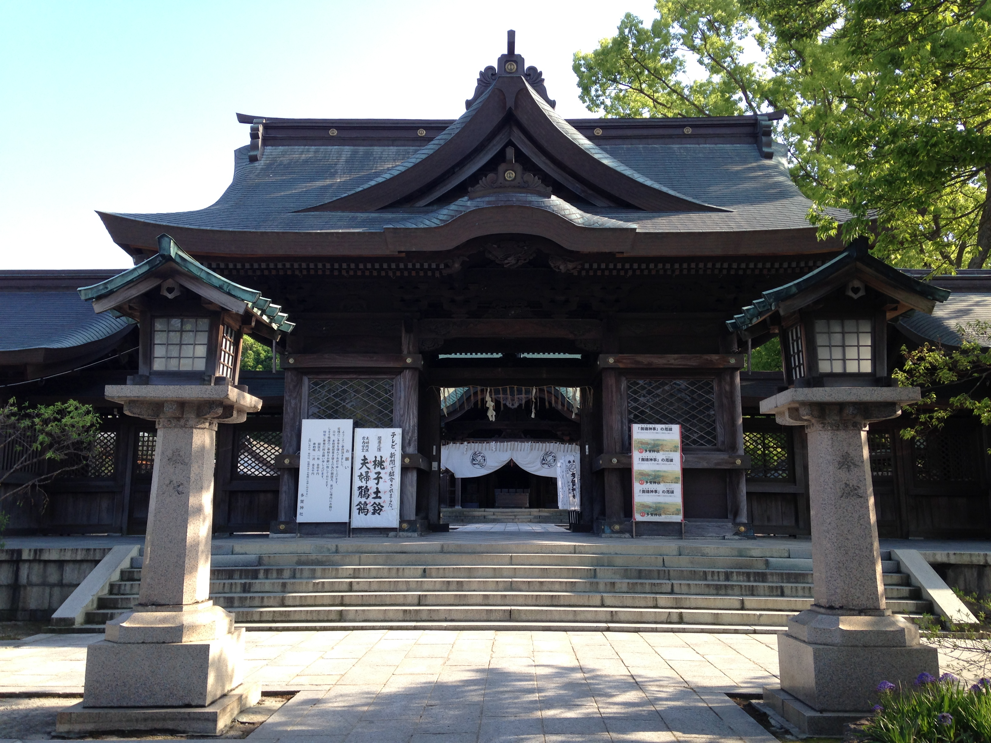 多賀神社の楼門